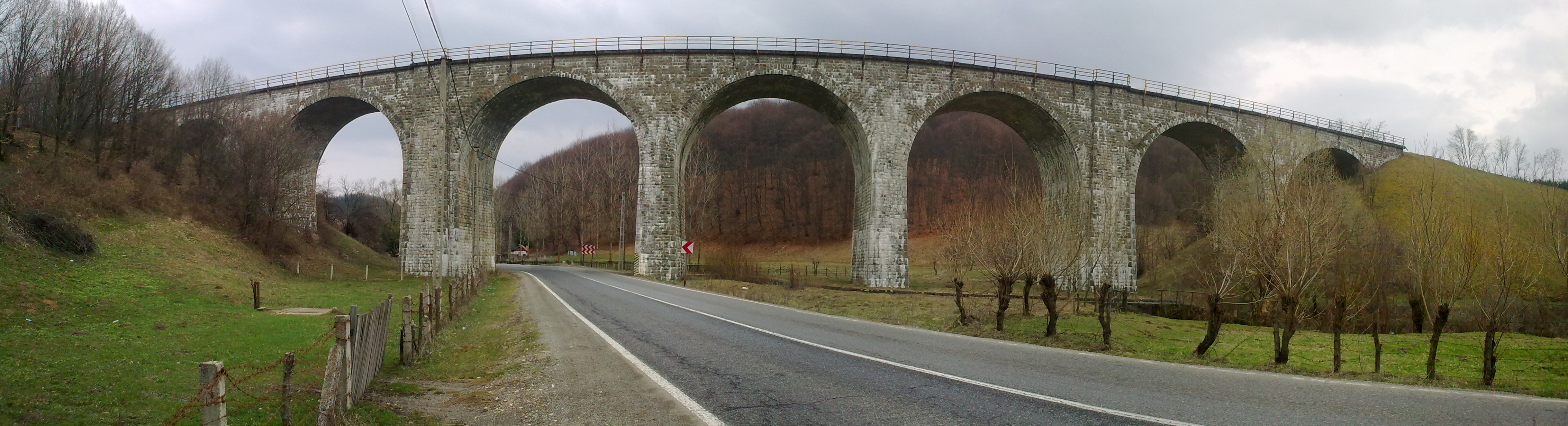 Panoramă a podului de cale ferată din apropierea localității Teliu, județul Brașov.